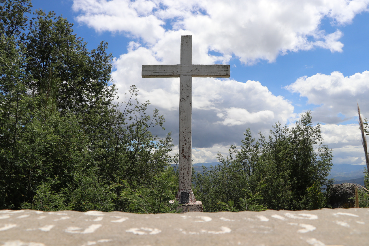 Cruz de Aranda actualmente